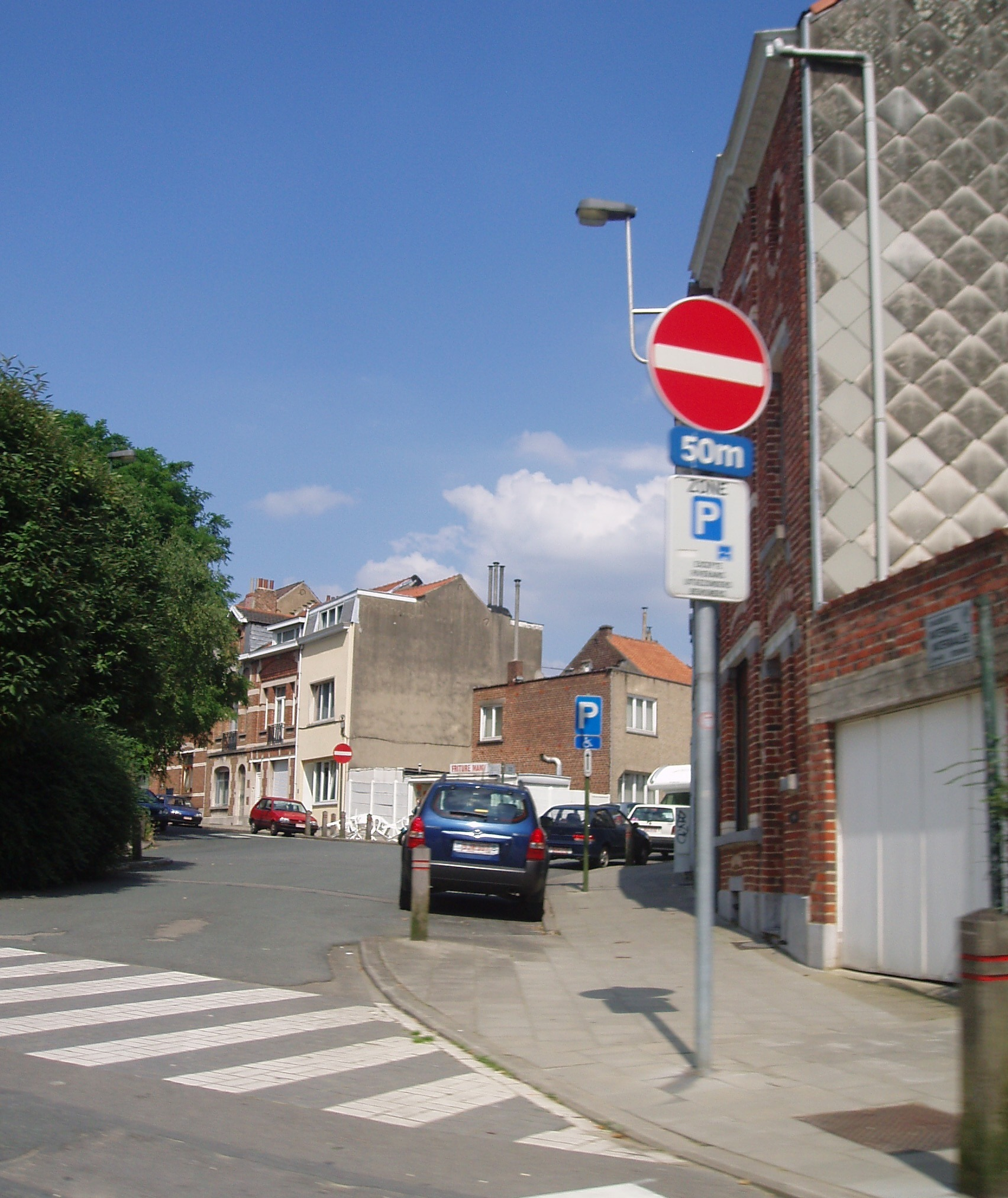 chaussée de Watermael Auderghem Belgium